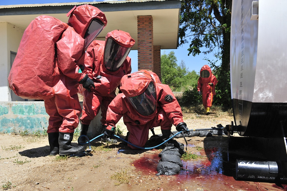 THE ASEAN REGIONAL FORUM DISASTER RELIEF EXERCISE (ARF DiREx) 2013, CHA-AM, THAILAND, 7-11 MAY 2013